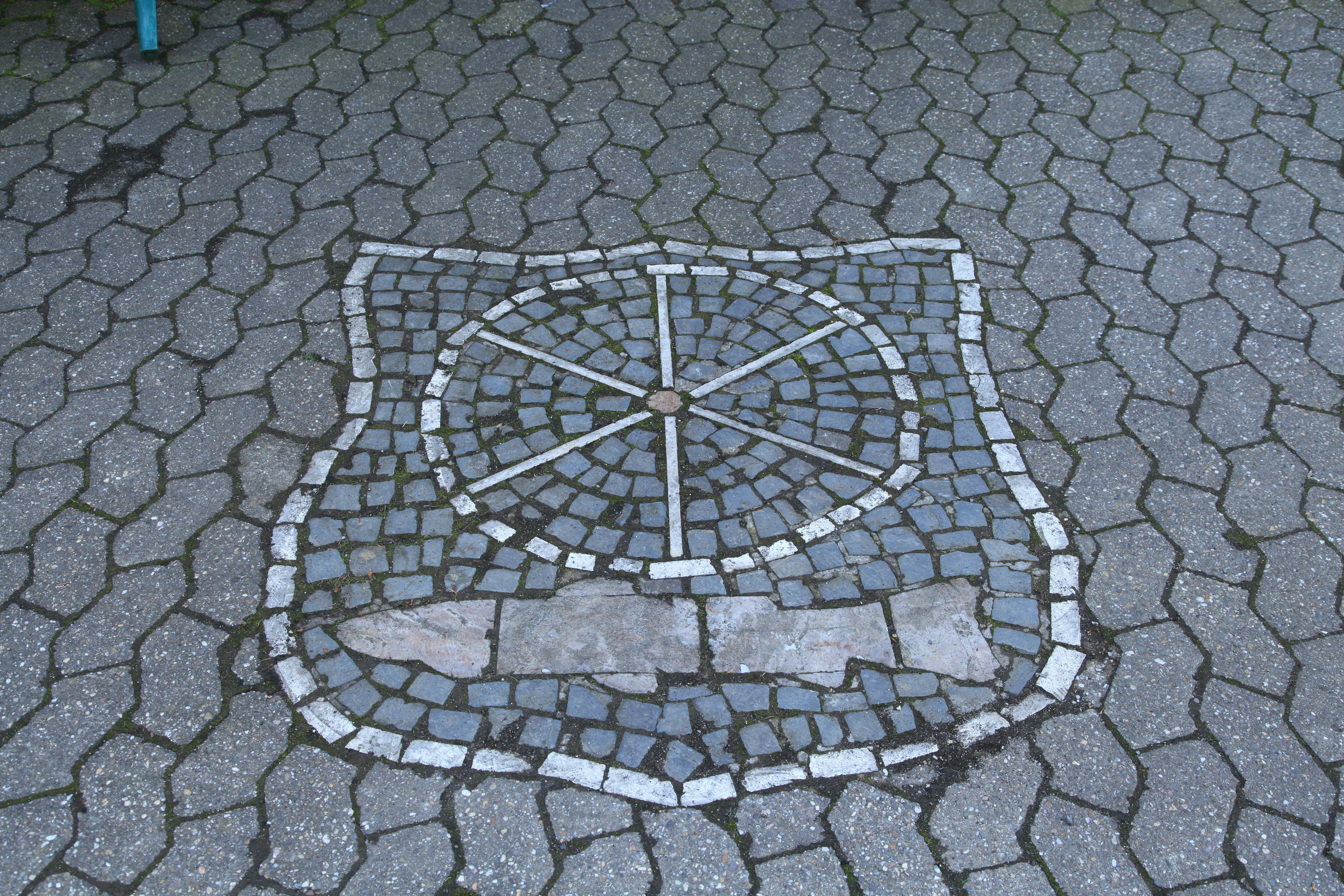 Knochenmühle in Wermelskirchen-Knochenmühle